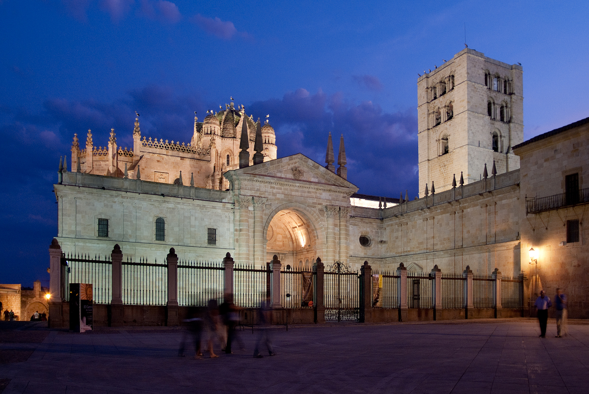 Vista nocturna de la catedral de Zamora.